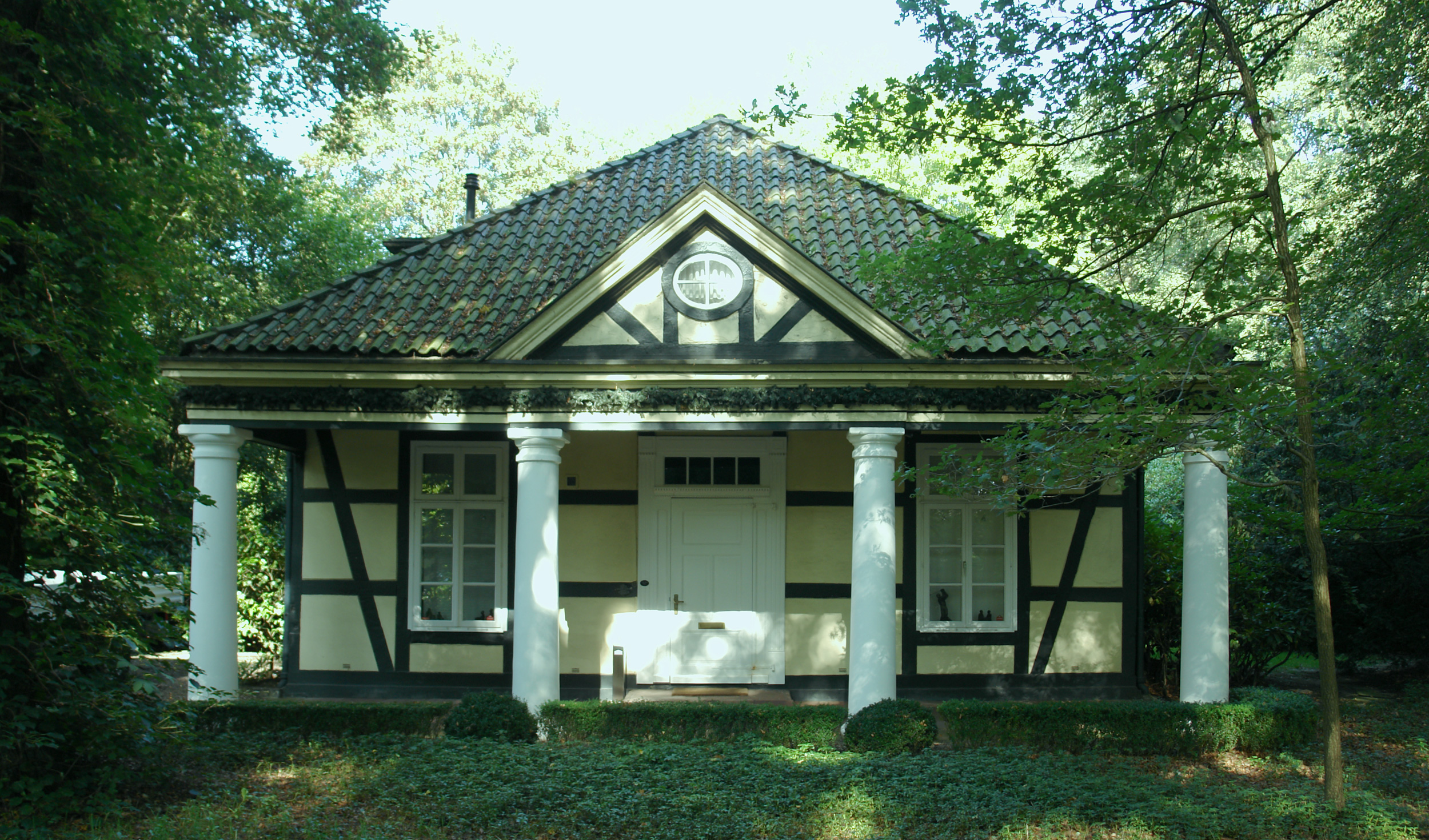 Heinekens Park, Hofmeierhaus in Bremen, Oberneulander Landstraße 153.Das abgebildete Objekt ist ein geschütztes Kulturdenkmal in der Freien Hansestadt Bremen, mit der Nr. 1733 beim Landesamt für Denkmalpflege registriert.